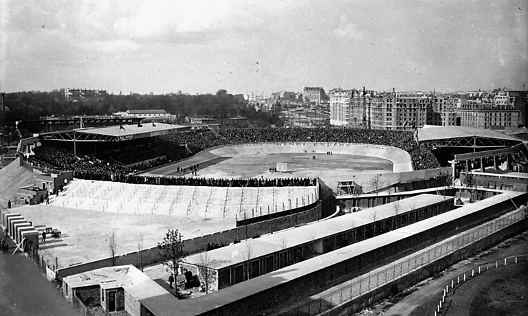 Vue générale du Parc des Princes (Paris) en 1932